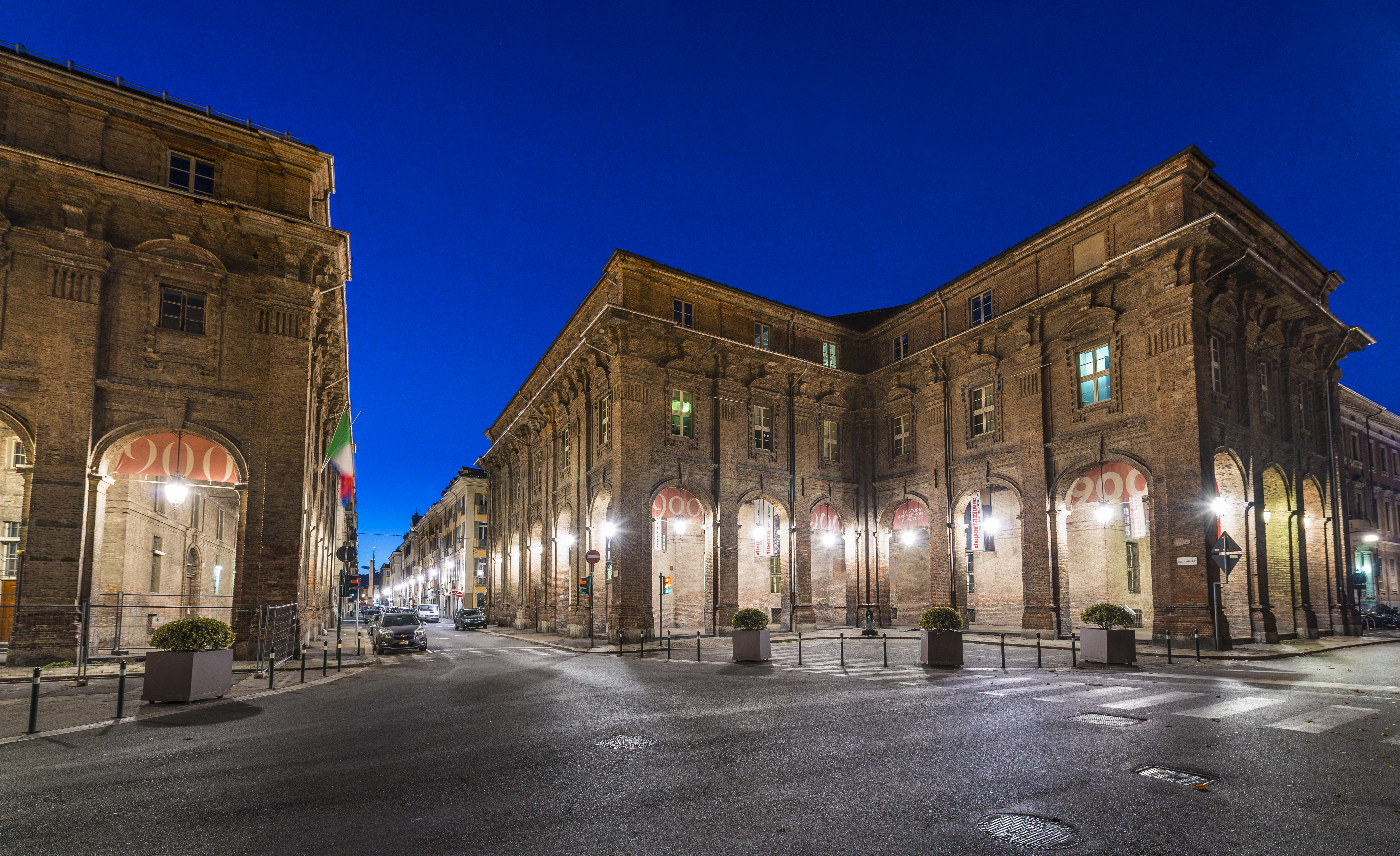 Fotografia dei palazzi Juvarriani che ospitano il Polo de '900